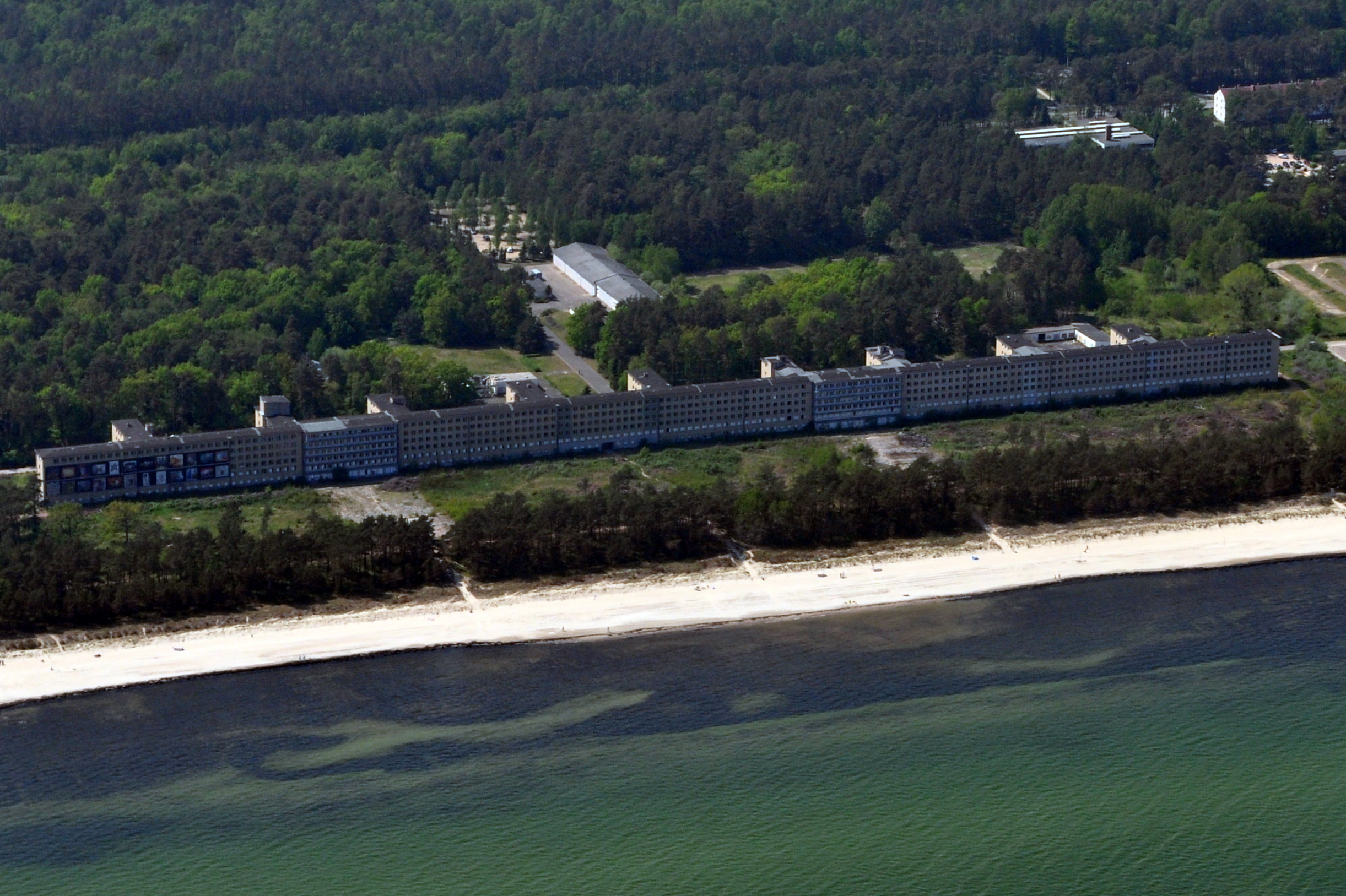 Die Bilder wurden von mir während eines einstündigen Rundflugs ab Flugplatz Güttin am 21. Mai 2011 aufgenommen. Die Bildbeschreibung steht im Dateinamen. Aufgenommen mit einer Nikon D5000 durch das Seitenfenster des Flugzeugs.